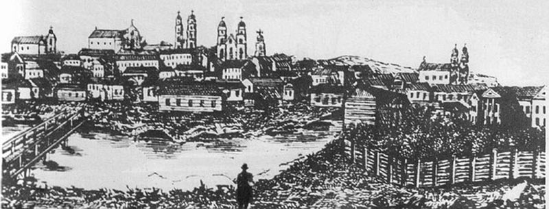 Беларуская (тарашкевіца): Менск (Miensk), рака Сьвіслач (Śvisłač) і Траецкая гара (Trajeckaja hara). Манастыр Сьвятой Тройцы